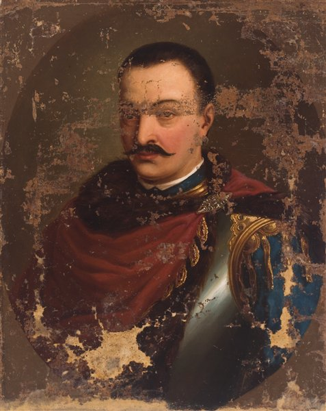 Беларуская (тарашкевіца): Партрэт Яна Яленскага (Jan Jalenski)